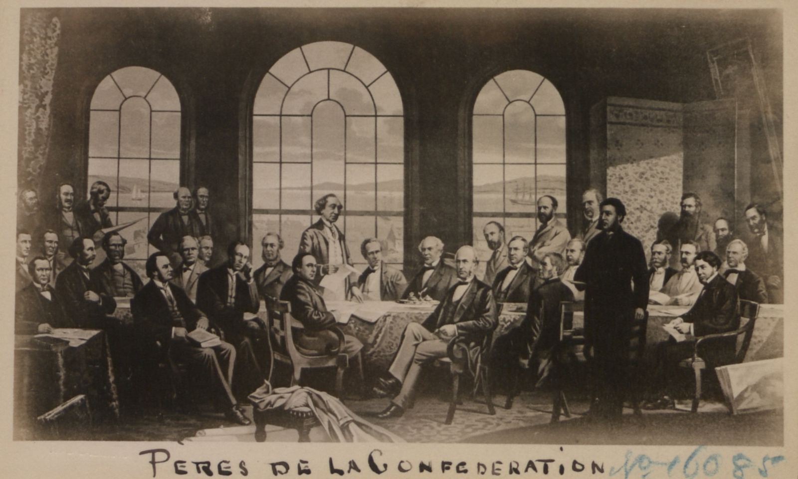 Peres de la Confederation. No. 62.